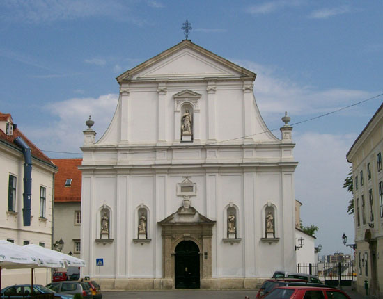 Crkva sv. Katarine (Gornji grad, Zagreb)